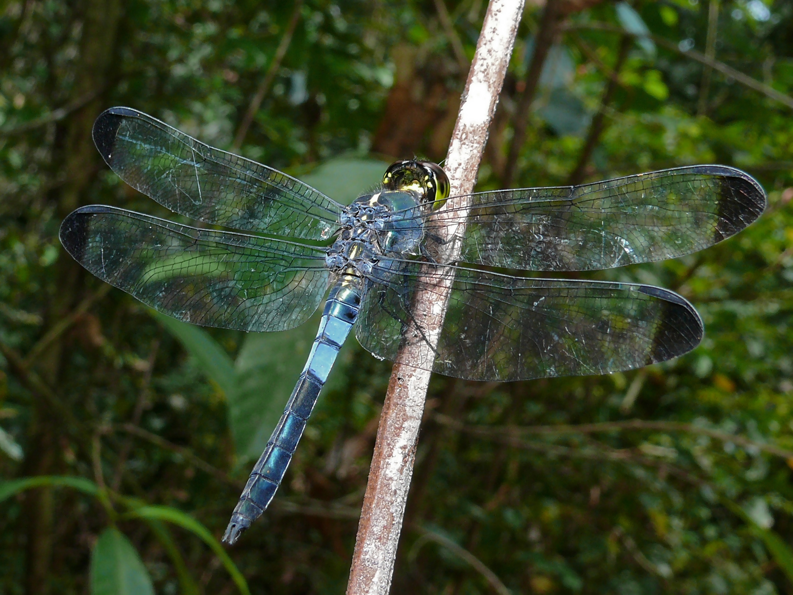 Niah NP, Sarawak, MALAYSIA